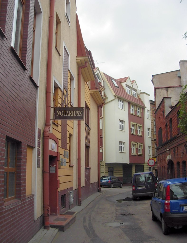 Ulica Pod Blankami w Bydgoszczy